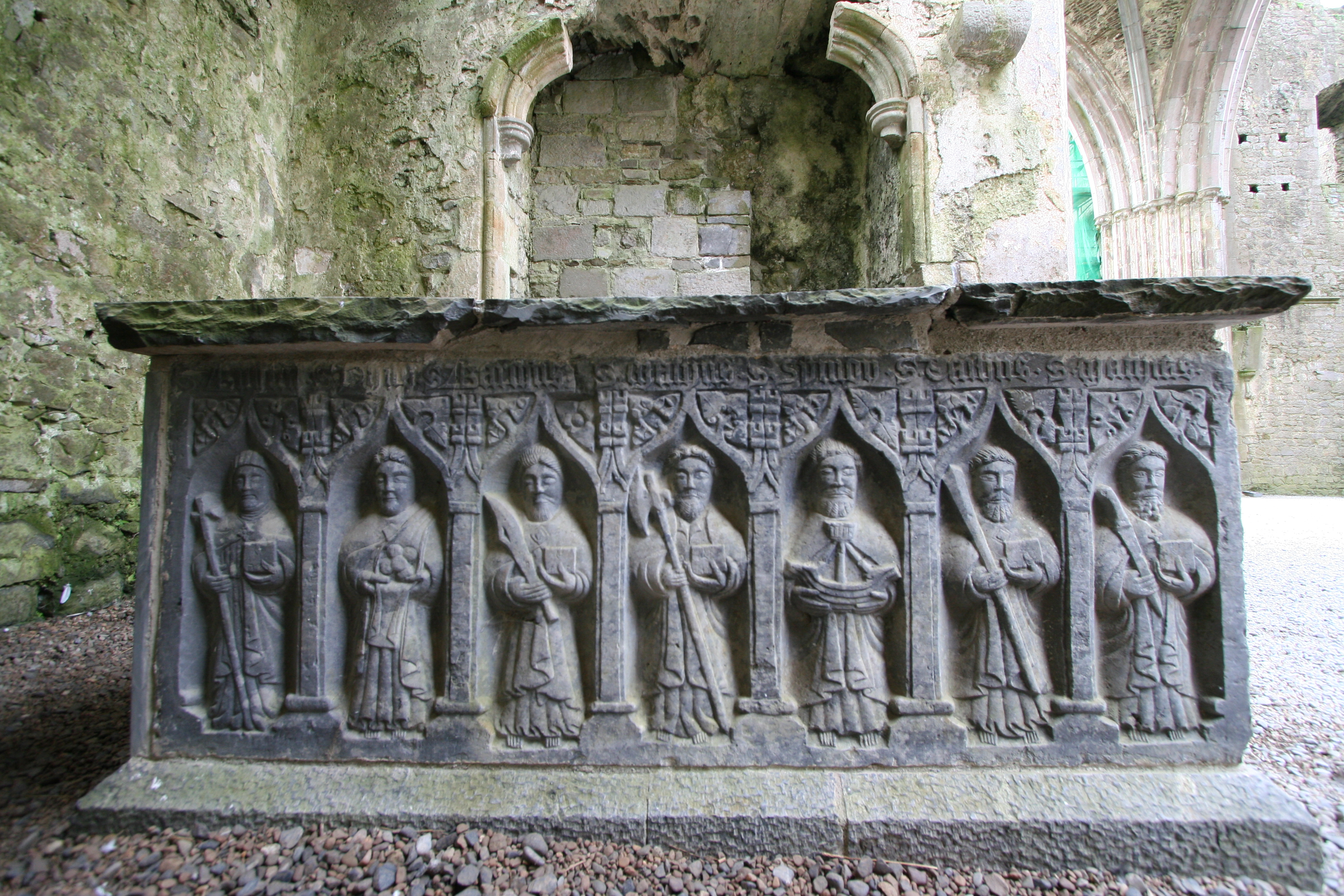 Rock of Cashel, ruinas de la catedral, condao de Tipperary